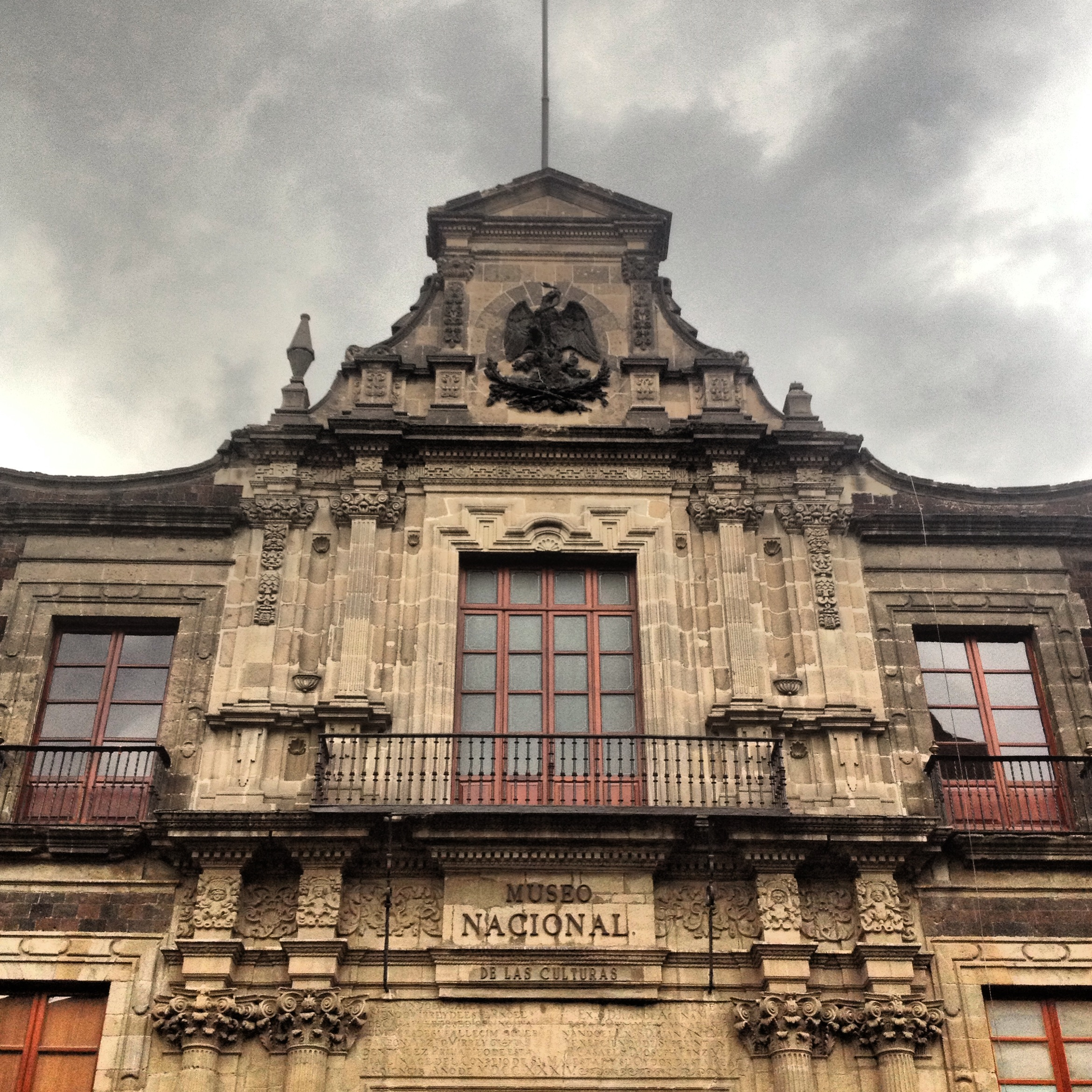 Detalle de la fachada del Museo Nacional de las Culturas.